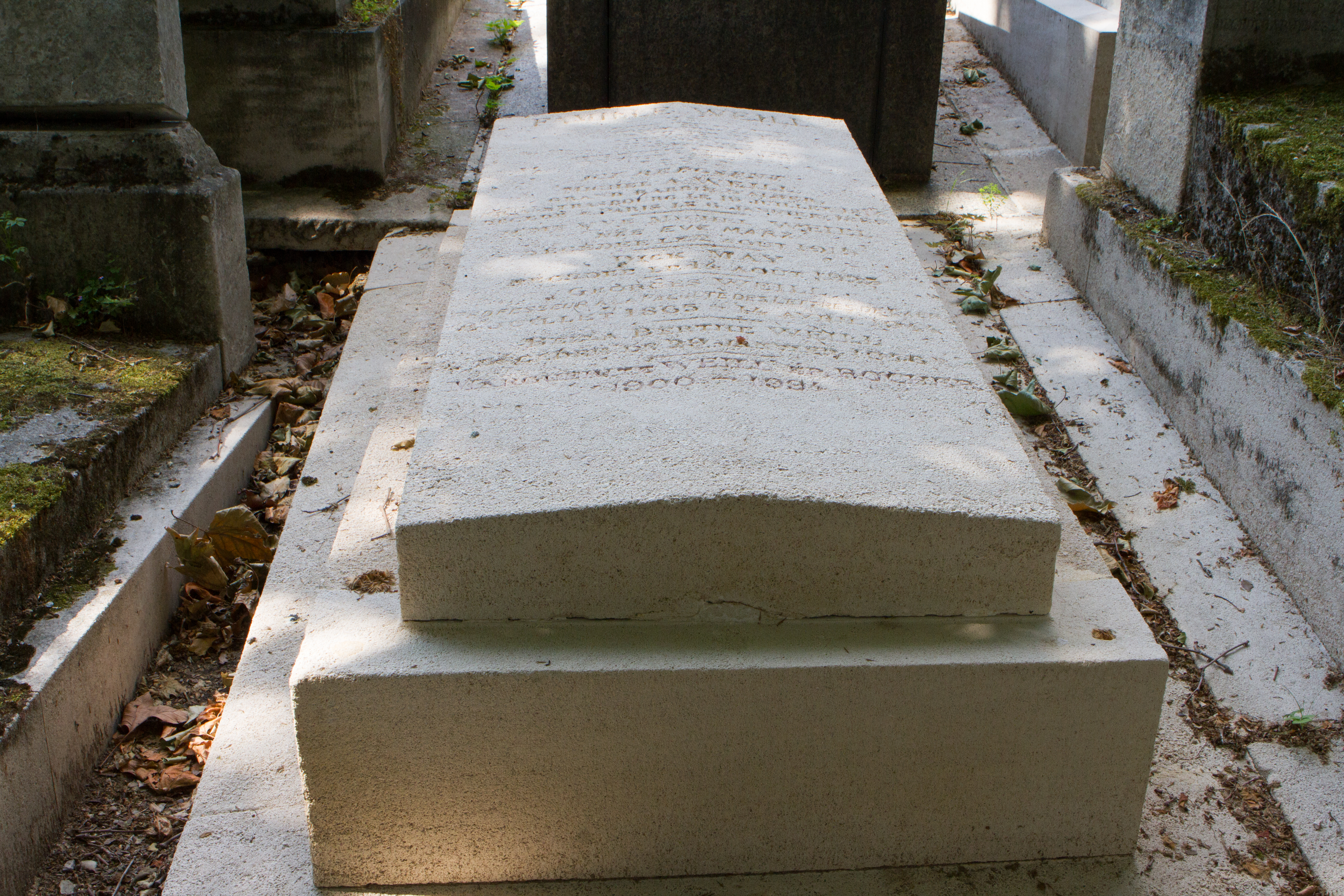 Sépulture de Georges Weill (1865-1944), historien.